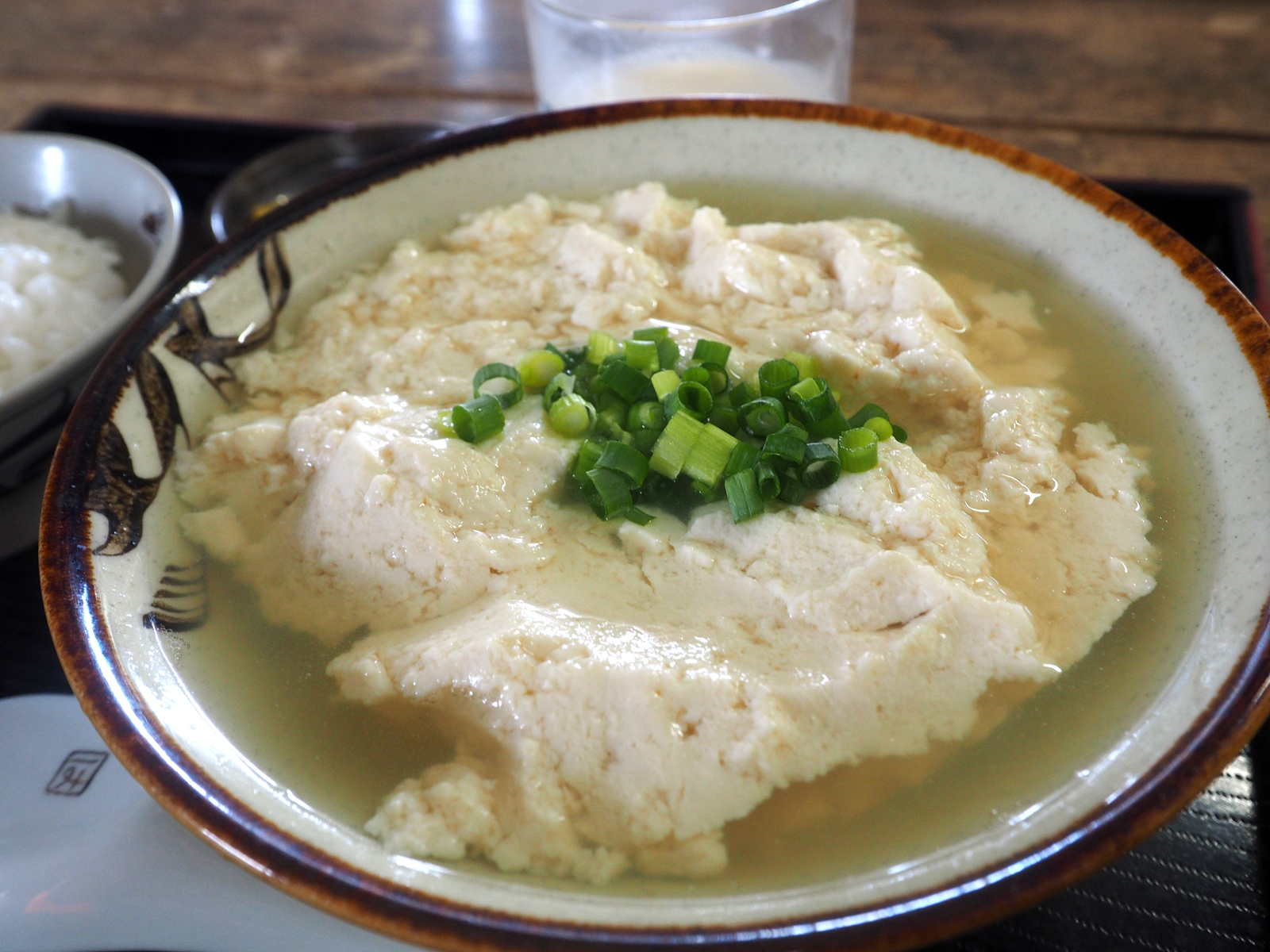 ゆし豆腐（沖縄県石垣市・とうふの比嘉）